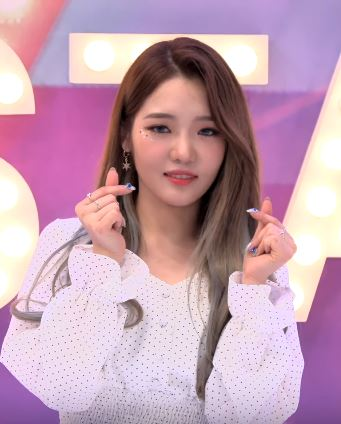 11일 오전 서울 상암동 tbs 오픈스튜디오에서 공개녹화로 ‘tbs 팩트인스타 - ‘프로미스나인’편이 진행됐다.